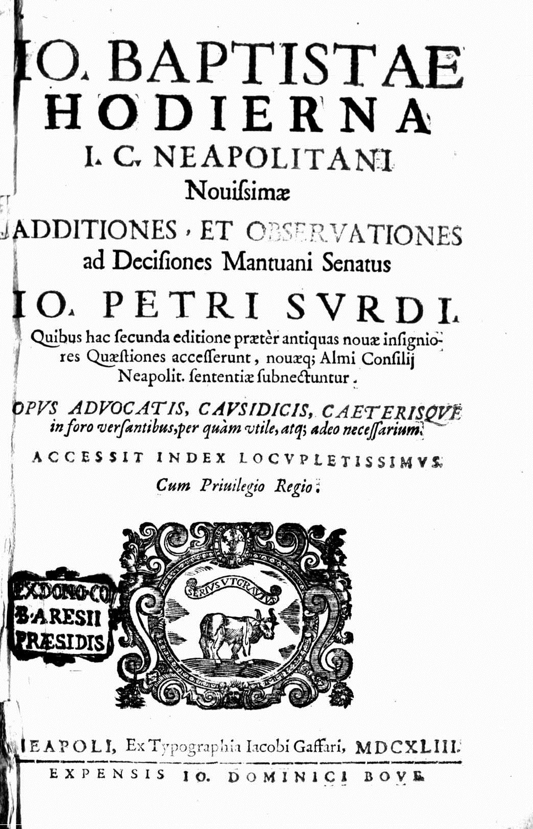 Frontespizio